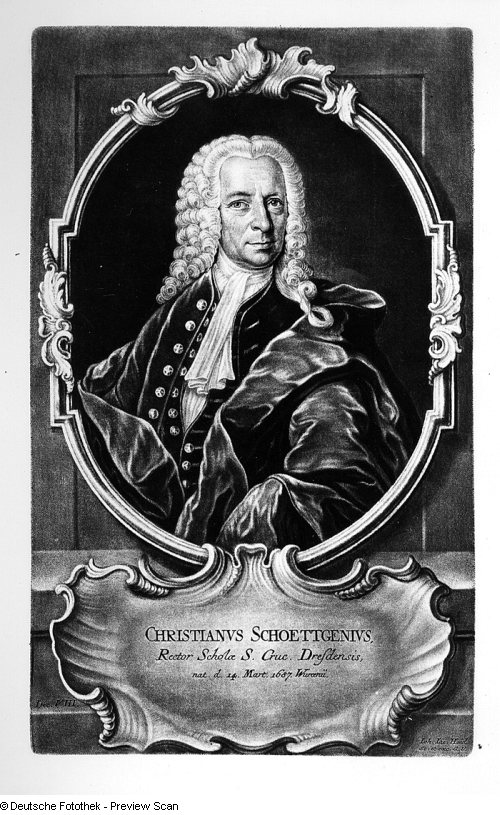 Johann Christian Schöttgen (1687-1751), Theologe, Pädagoge und Historiker